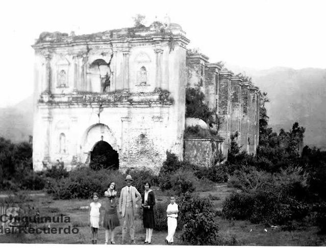 Iglesia antigua de Chiquimula en 1928.